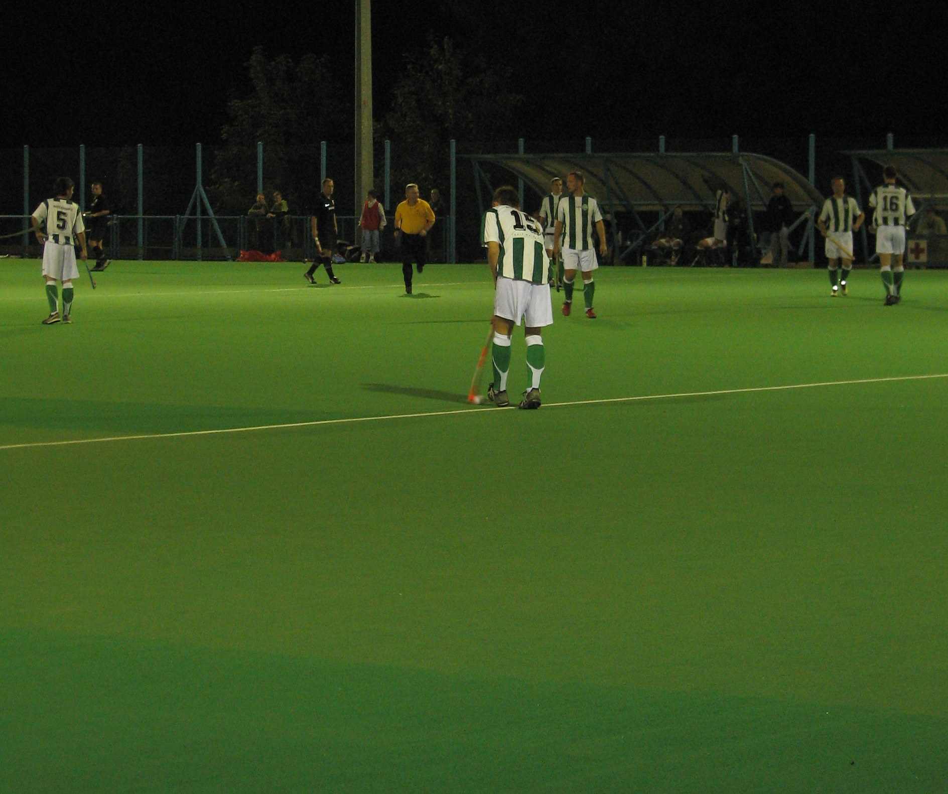 Derby z 19 września 2009 roku. Biało-zieloni ulegli drużynie Startu 1954. Wynik 2:3